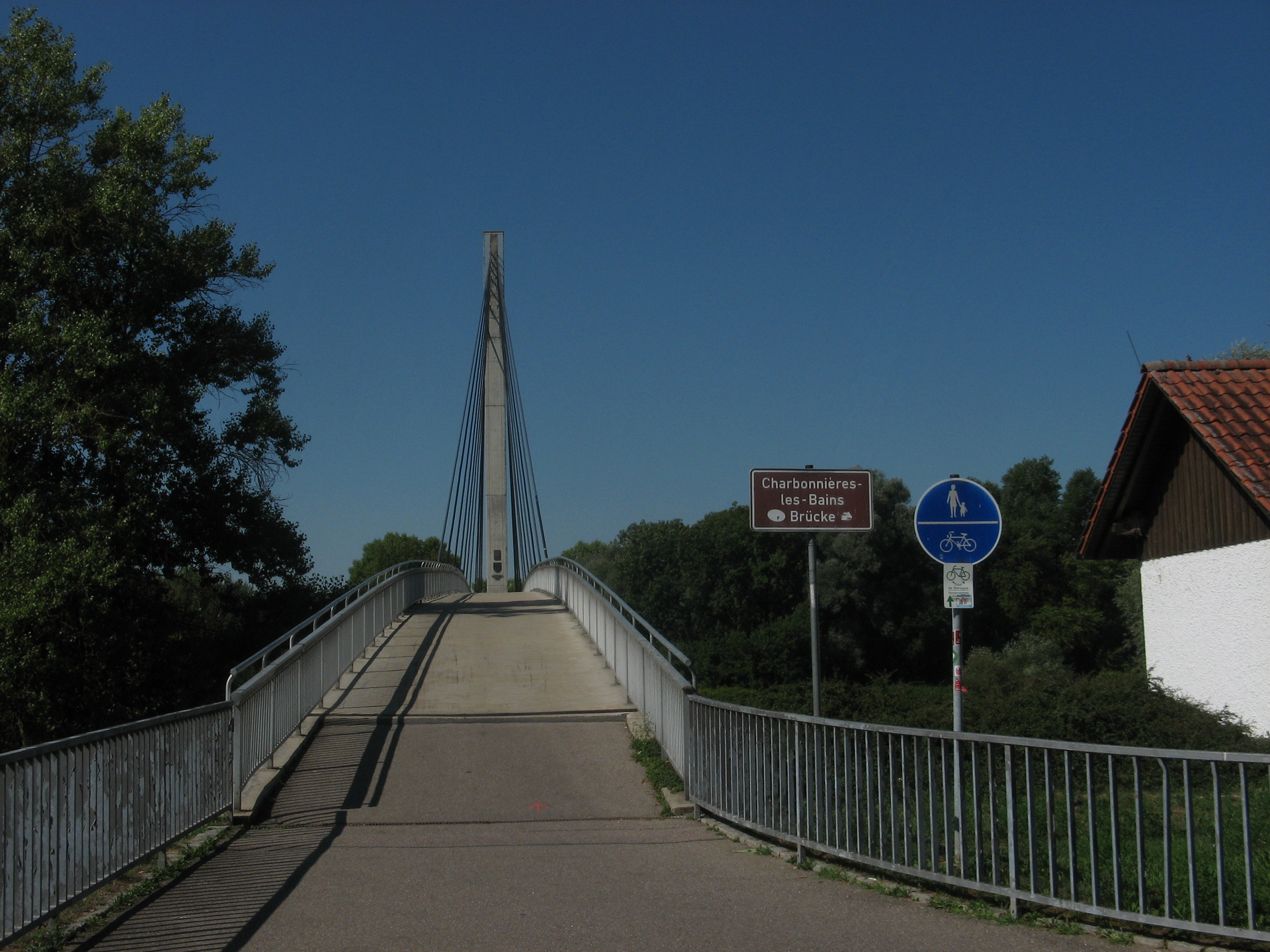 Jumelage